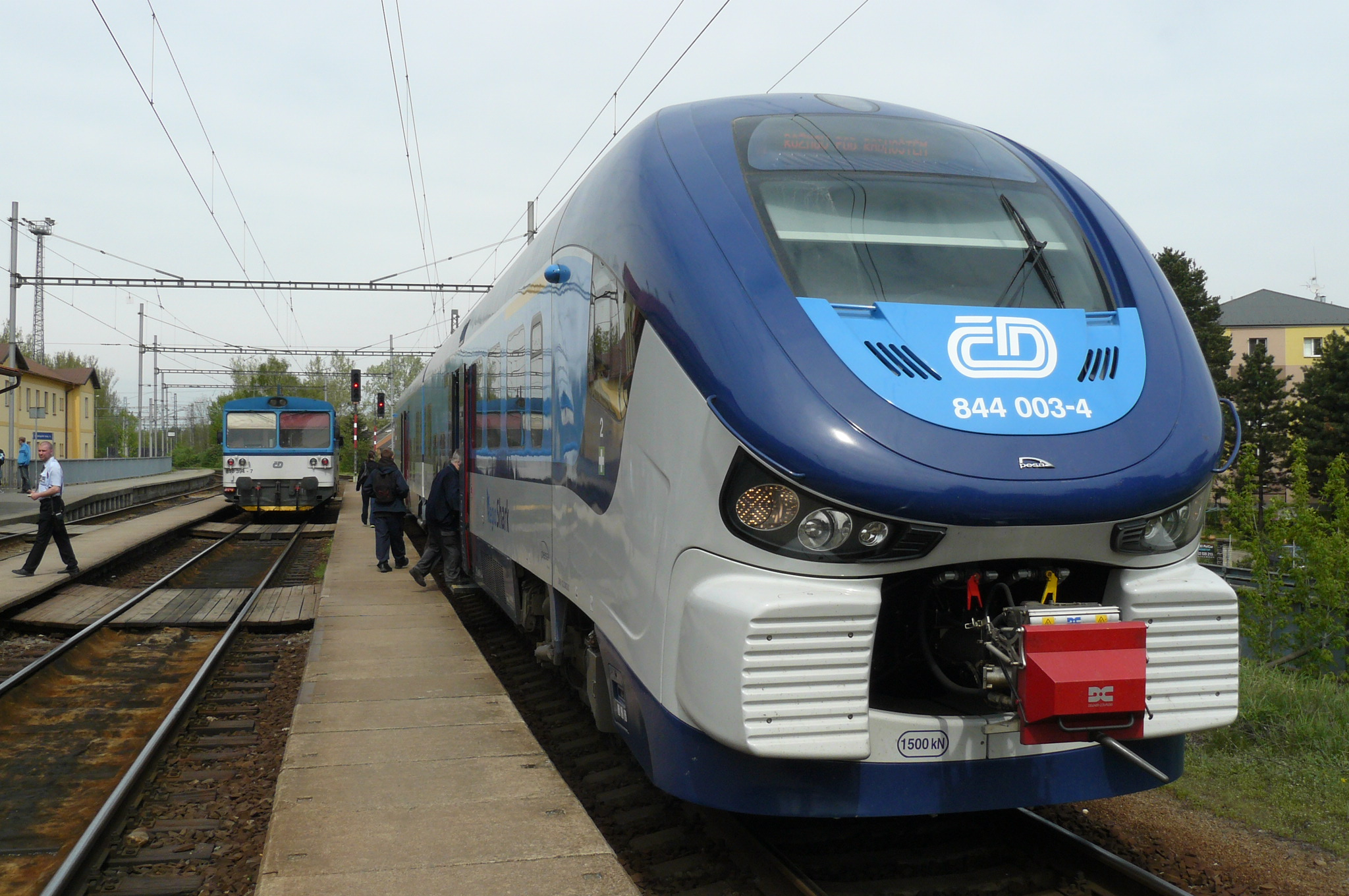 Hulin.